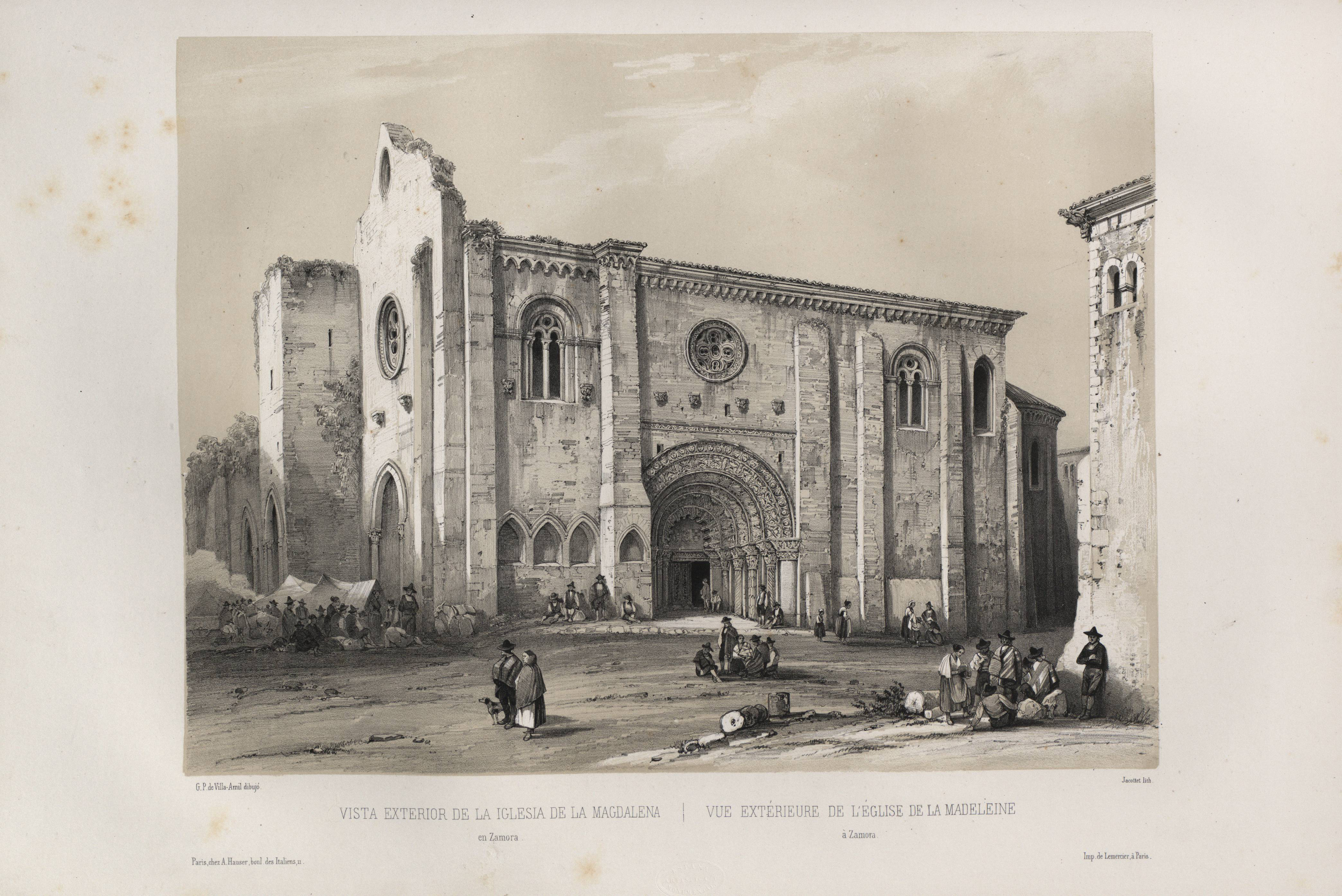 Vista exterior de la iglesia de la Magdalena en Zamora.